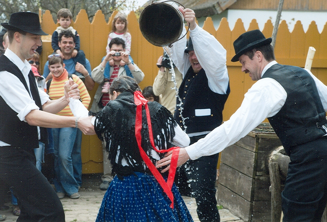 Húsvét Ópusztaszeren 2009.